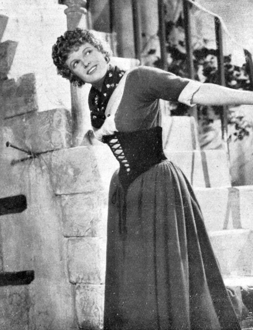 Anna Neagle in una immagine pubblicata in Italia nel 1935